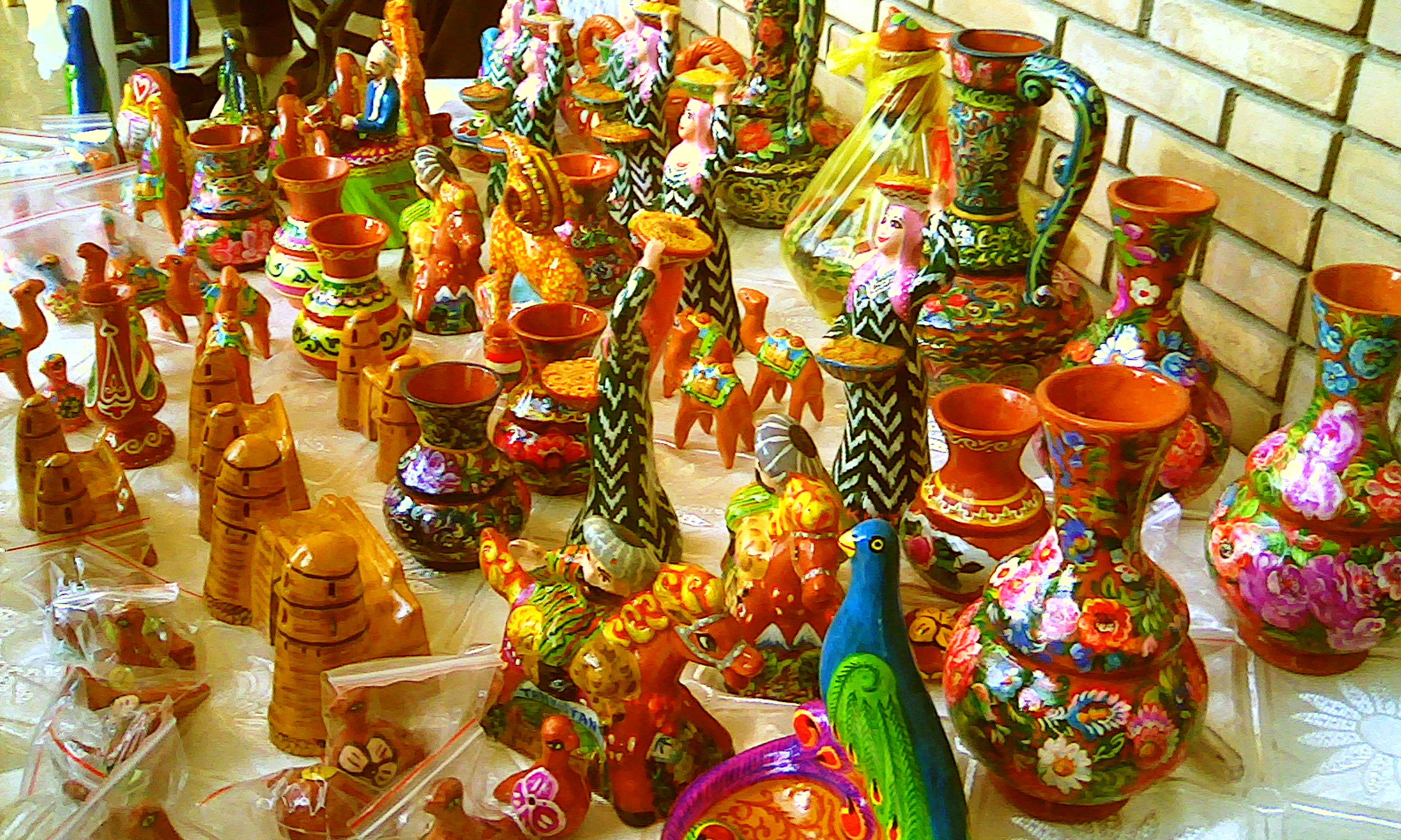 Глиняные игрушки ремесленников Таджикистана на выставке-ярмарке ремесленников, 2015 год